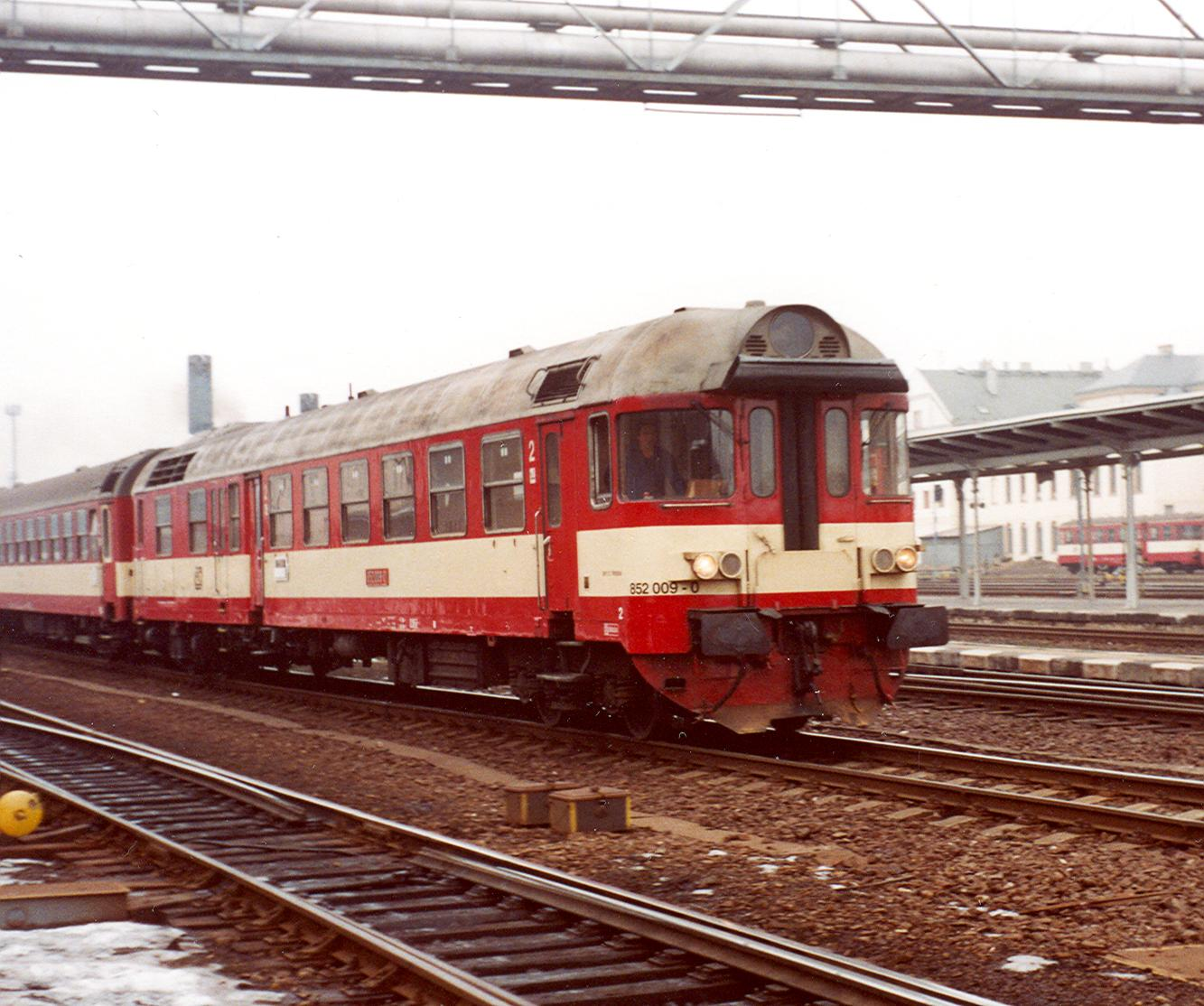 Triebwagen der Reihe 852, fotografiert 2001 in Liberec